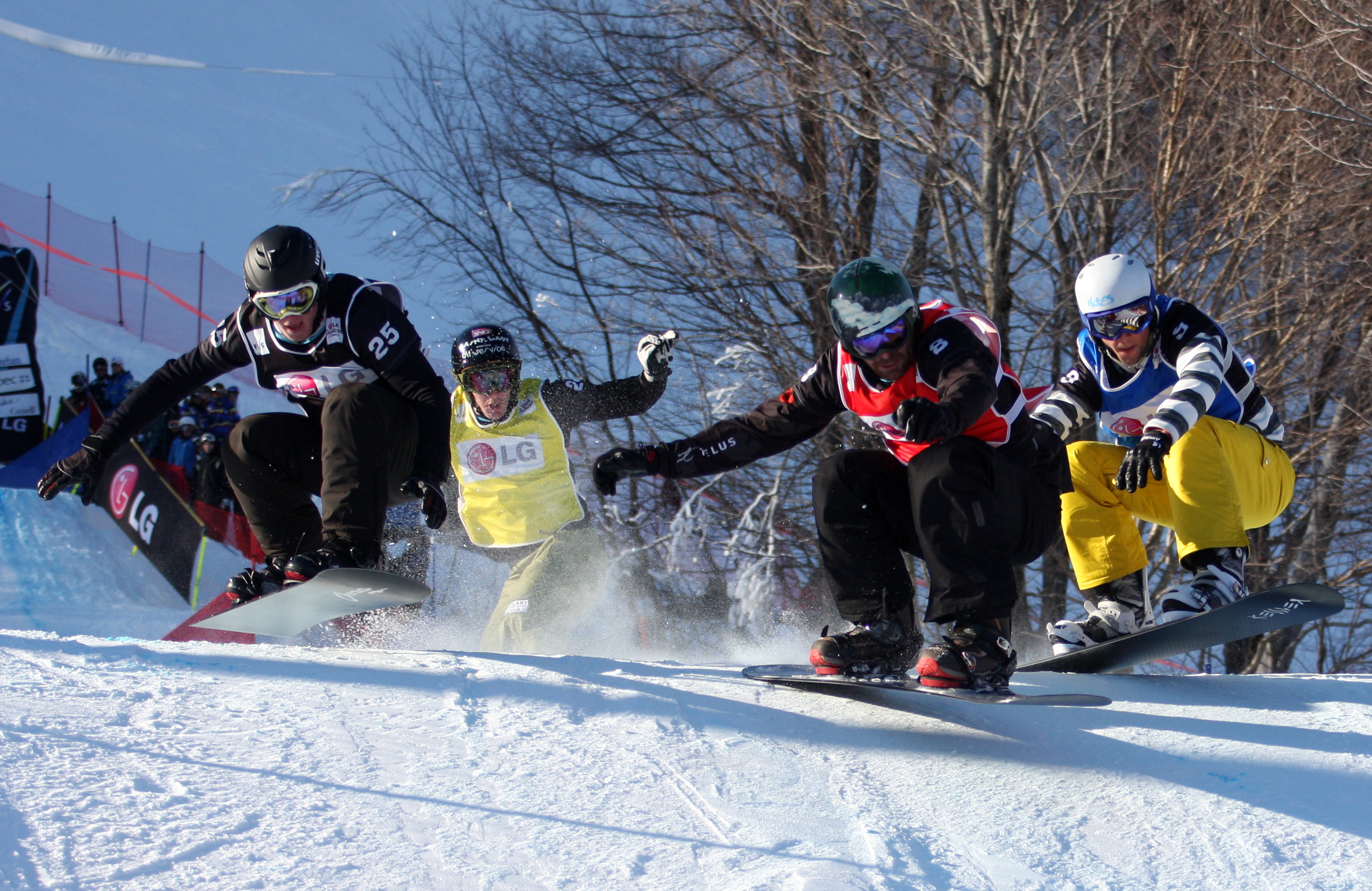 Stoneham_SBX_Finals_Heat_2_Men_Andrey_Boldykov_RUS_Paul-Henri_Delerue_FRA_Tom_Velisek_CAN_Kevin_Hill_CAN